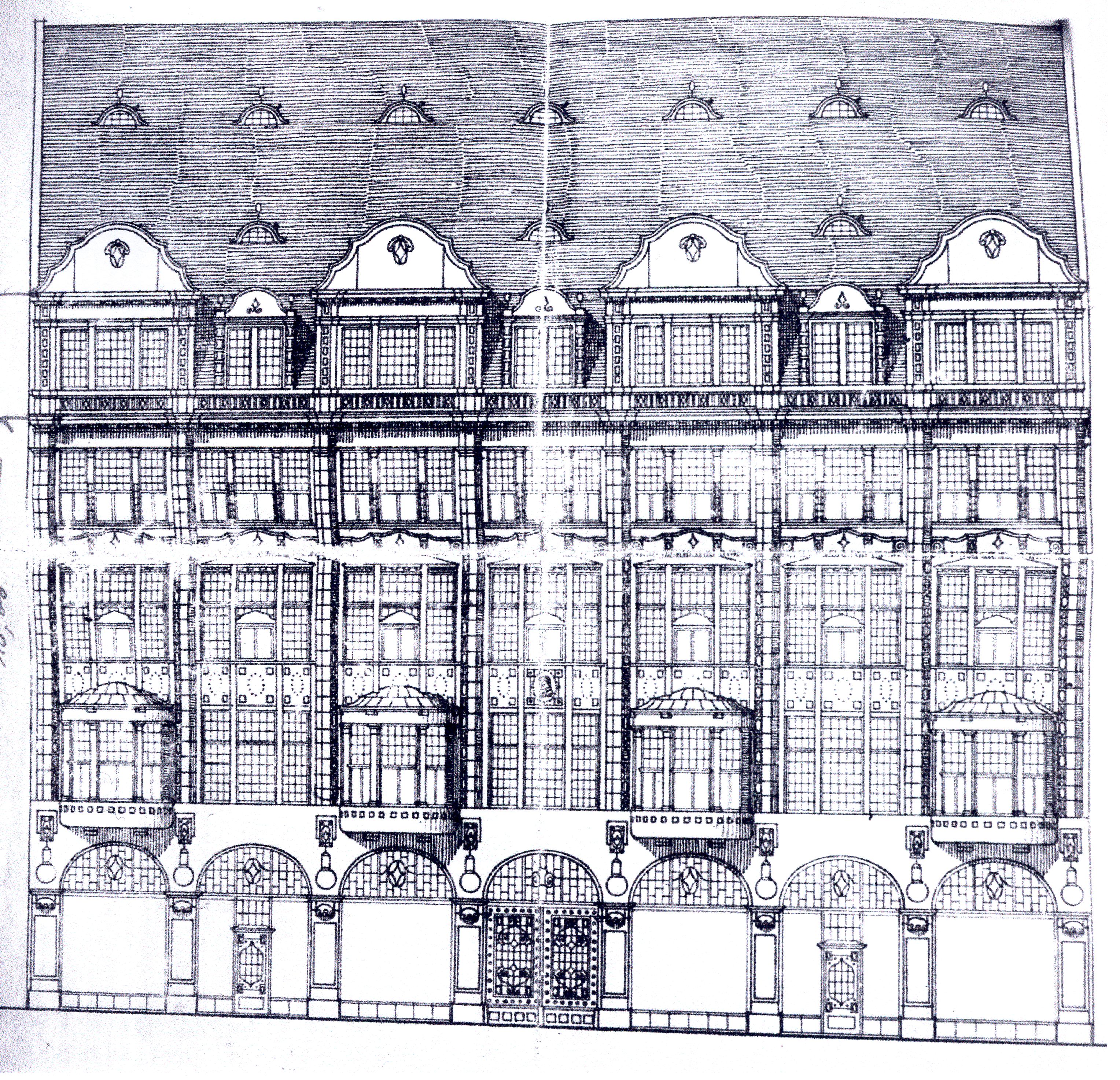 Originale Bildbeschreibung: Zeppelin-Haus, Nikolaistraße 27-29 [Leipzig] errichtet 1911 nach Plänen von Johann Gustav Pflaume. Erster Entwurf von 1910 mit einetaigen Erkern. Aus: Jens Schubert: Die Pelzgewerbehäuser in der Leipziger Innenstadt. Mag.-Arbeit, Leipzig 2003.